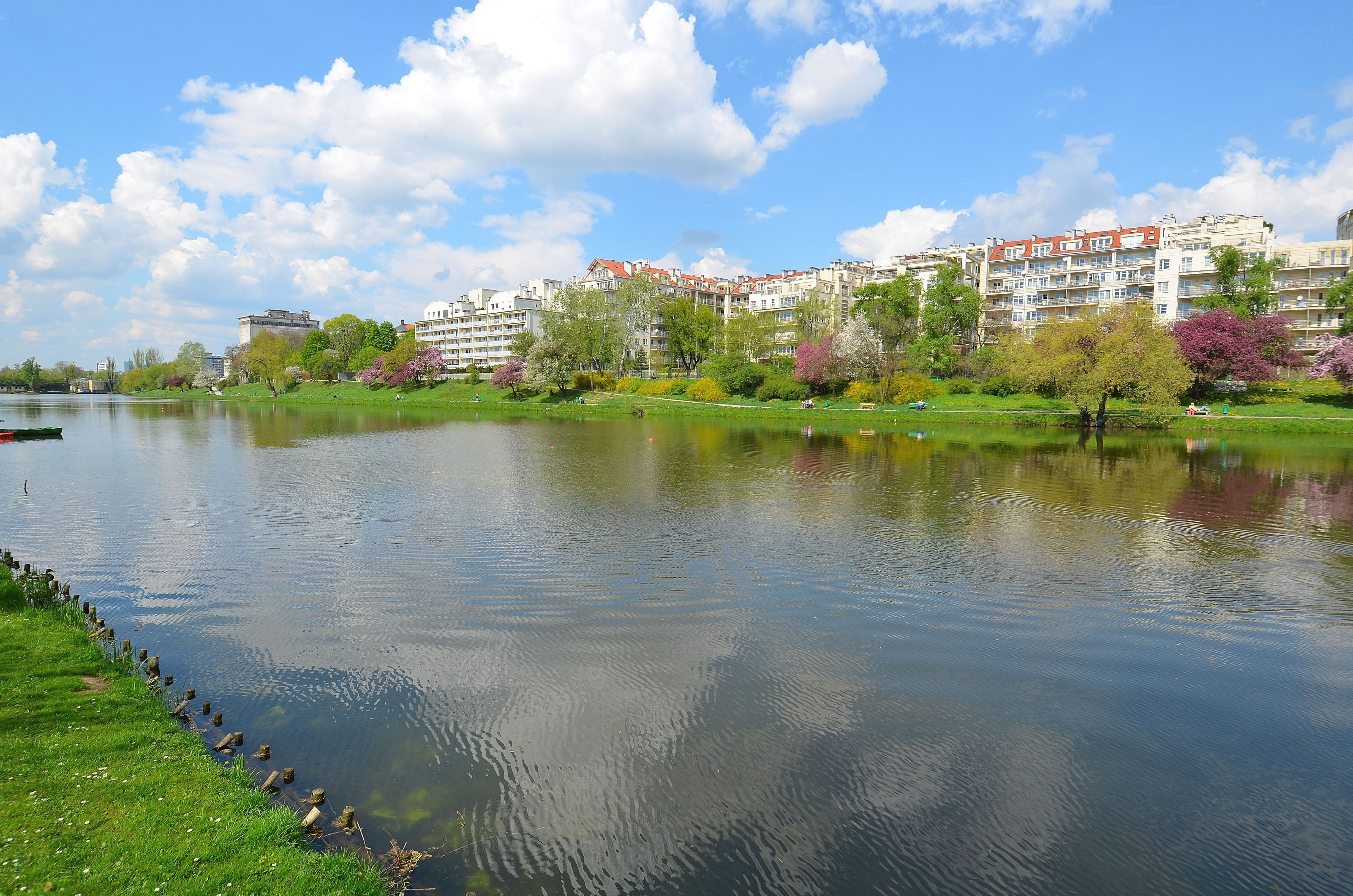 Jeziorko Kamionkowskie w Warszawie